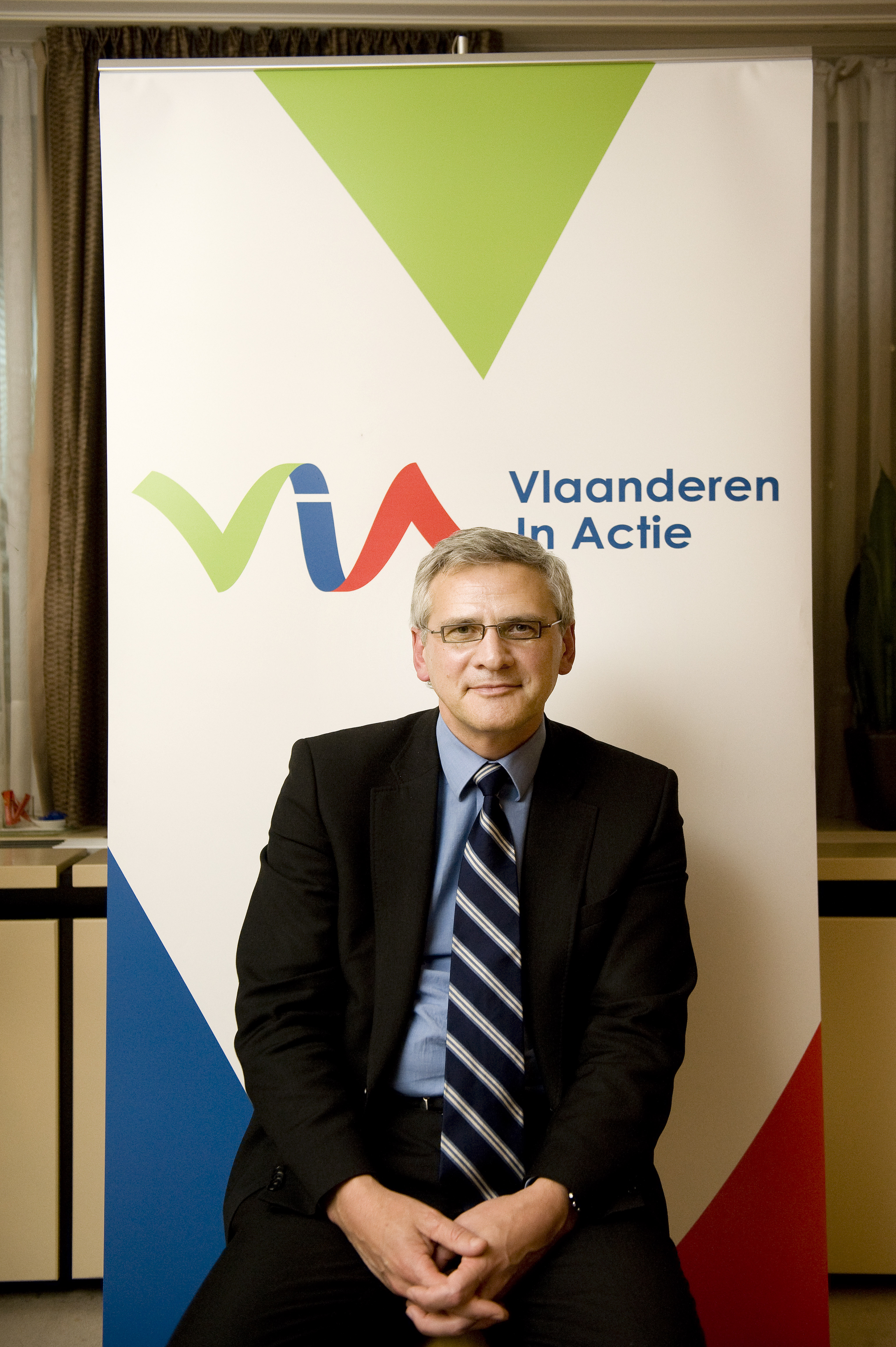 Kris Peeters, Vlaams politicus voor de CD&V en gewezen Minister-president van Vlaanderen